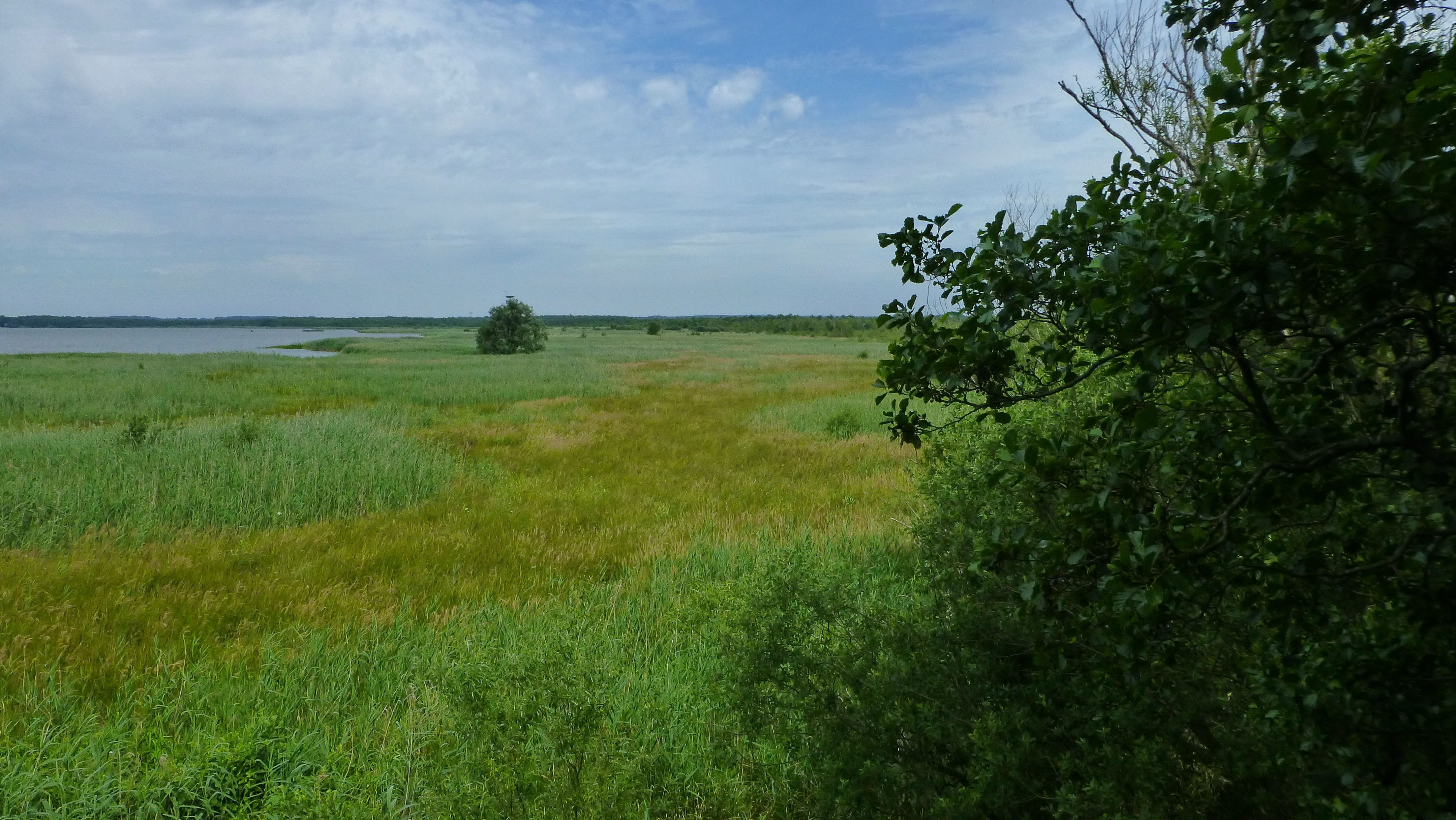 Naturschutzgebiet „Ostufer Steinhuder Meer“ (NSG HA 030): Links ist das Ostufer des Steinhuder Meeres zu sehen, es folgt ein breiter Verlandungsgürtel und am rechten Bildrand beginnt der Erlenbruchwald. (Blick von der Beobachtungsplattform)